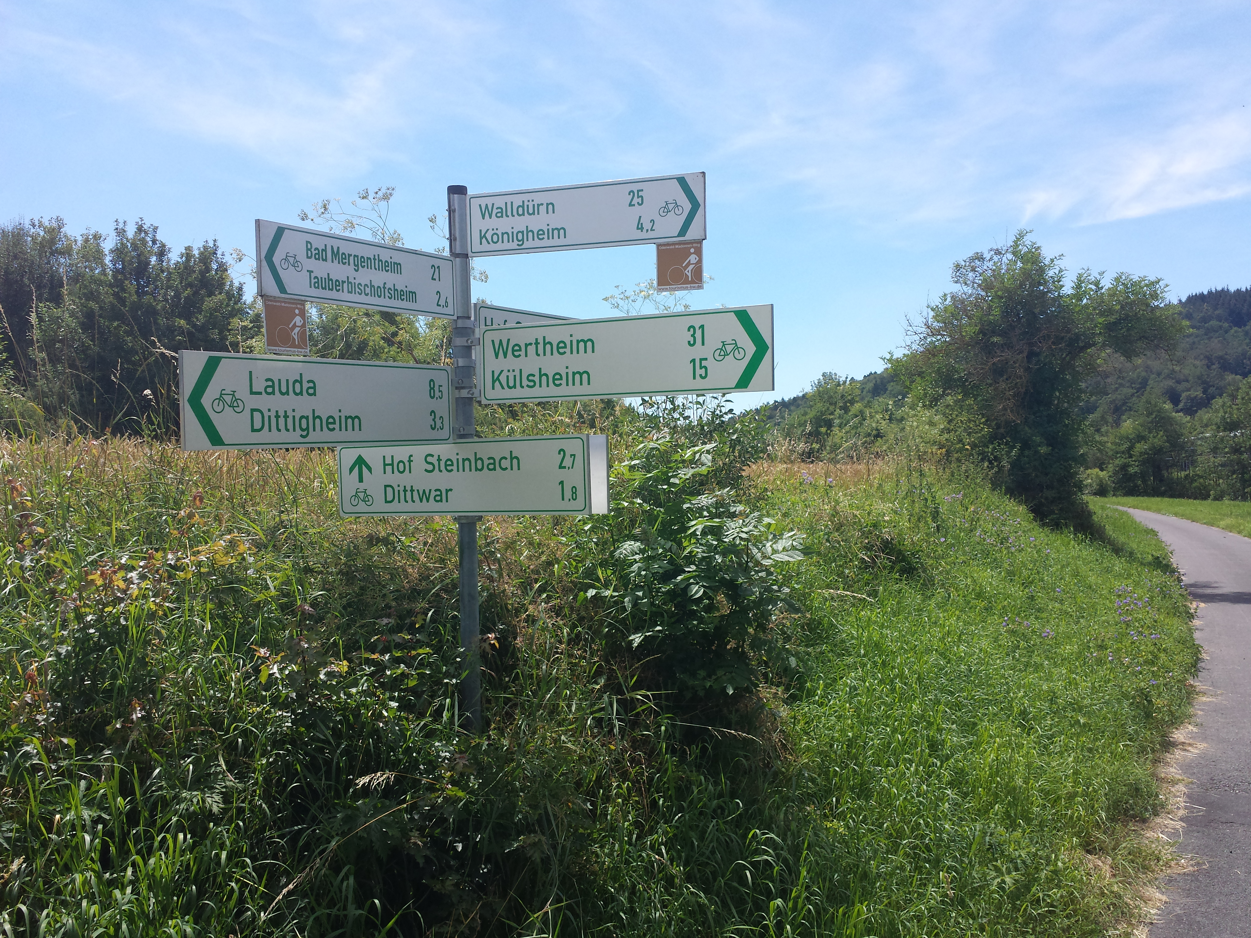 Radwegekreuzung bei Tauberbischofsheim, am Radweg von Tauberbischofsheim nach Dittwar an der Abzweigung in Richtung Königheim. Am Schild kreuzen sich der Muckbachtalradweg (aus Heckfeld und Dittwar kommend) und der Brehmbachtalradweg (aus Königheim kommen).